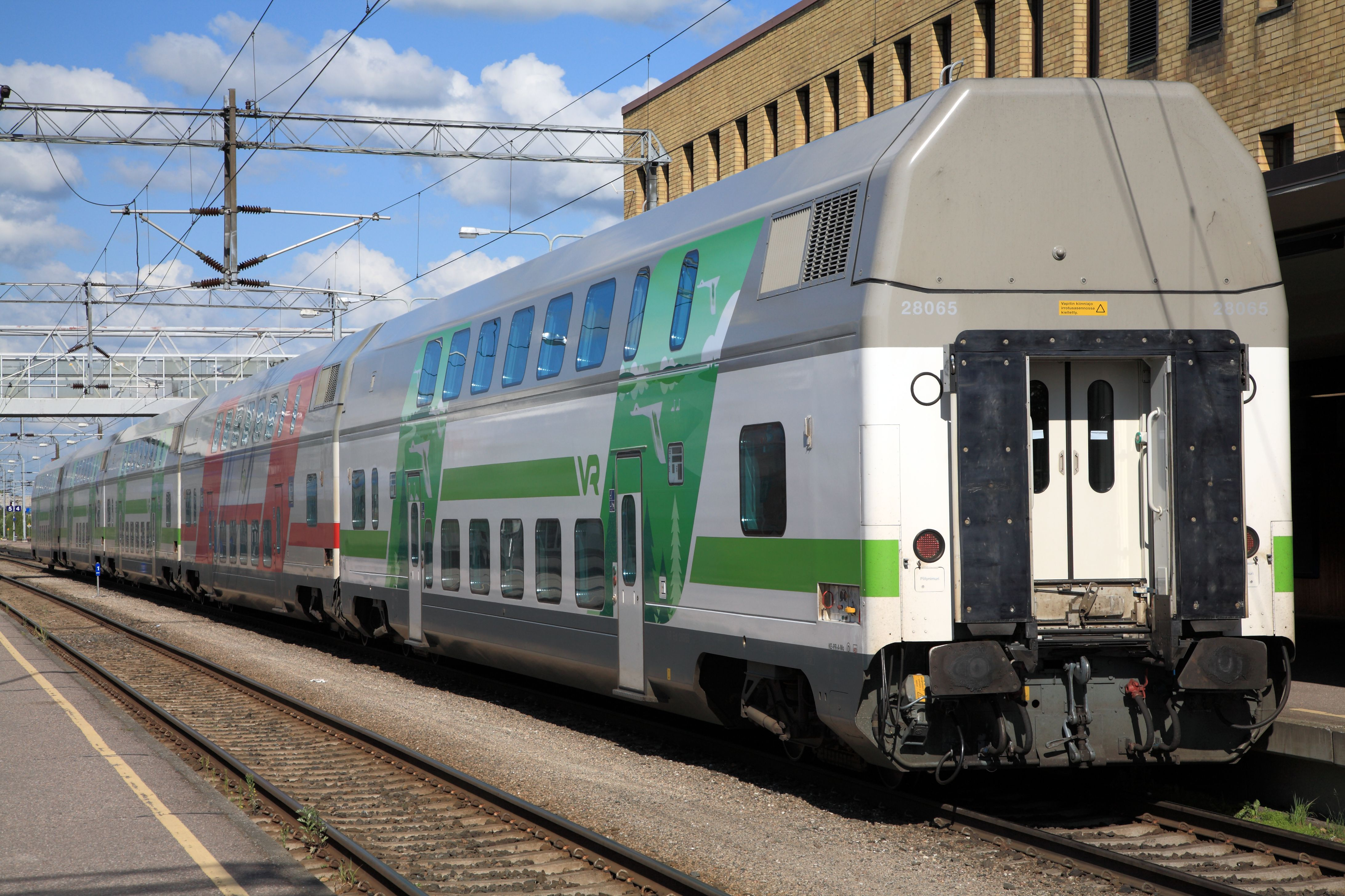 unbespannte IC2-Zugeinheit am Hausbahnsteig in Turku. Der zweite Wagen läuft noch im Lieferanstrich weiß mit rot. Die für 2014 geplante Lieferung von Steuerwagen soll das Umsetzen in den Endbahnhöfen unnötig machen.